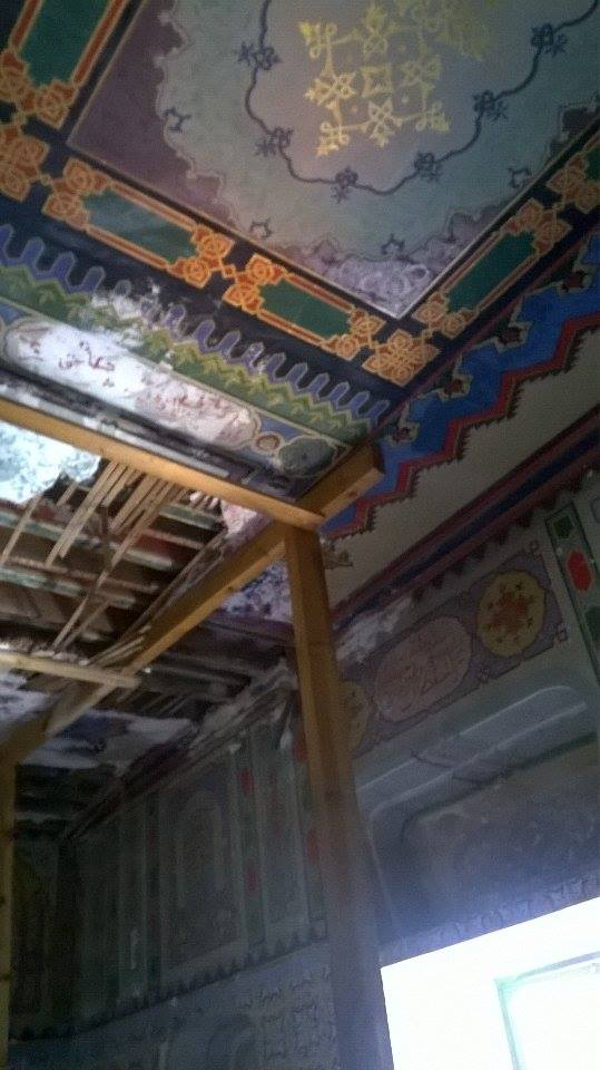 Palais du Bey d'Oran - plafond